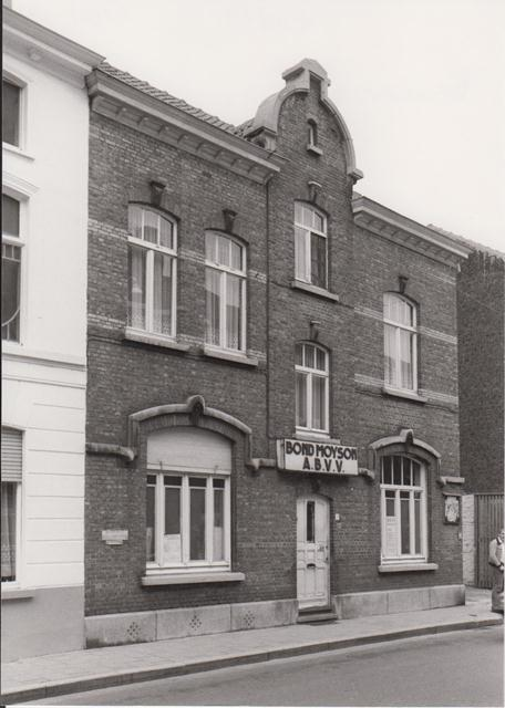 Gent Dahliastraat 27-27A